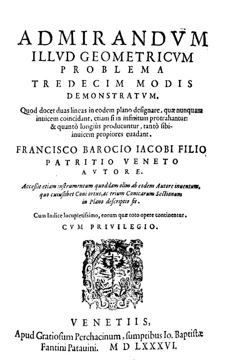 Admirandum illud geometricum problema tredecim modis demonstratum. quod docet duas lineas in eodem plano designare, quae numquam inuicem coincidant, etiam si infinitum protrahantur: & quanto longius producuntur, tanto sibi inuicem propriores euadant. Francisco Barocio ... autore. Accessit etiam instrumentum quoddam olim ab eodem inuentum, quo cuiuslibet conisortus, ac trium conicarum sectionum in plano descriptio sit. Cum indice locupletissimo .... - Venetiis : apud Gratiosum Perchacinum, sumptibus Io. Baptistae Fantini Patauini, 1586. - 269 [i.e. 273, 11] p. : ill. ; 4º .